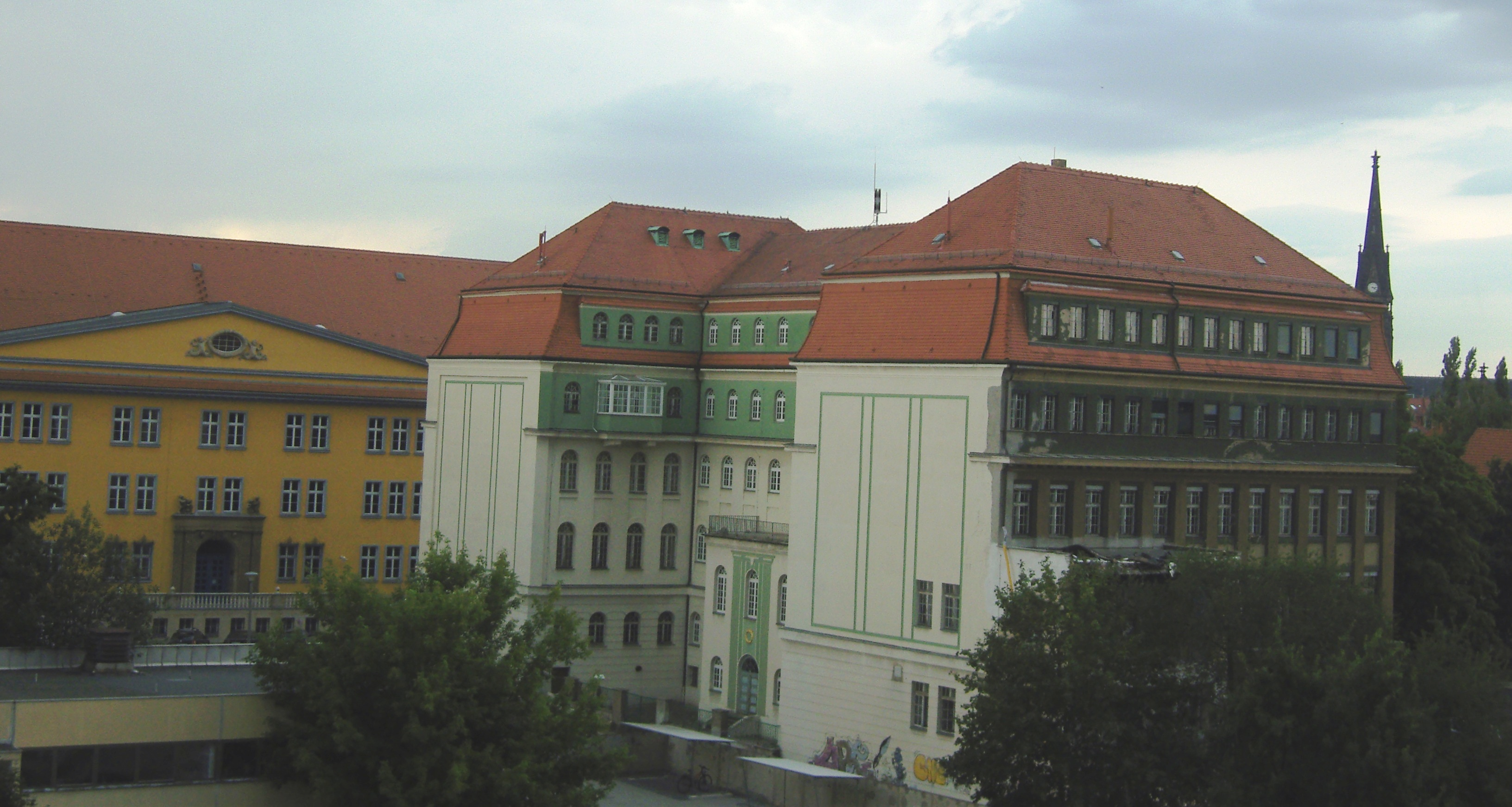 Rückansicht des Romain-Rolland-Gymnasiums in Dresden. Der Anbau an der rechten Bildseite wird abgerissen